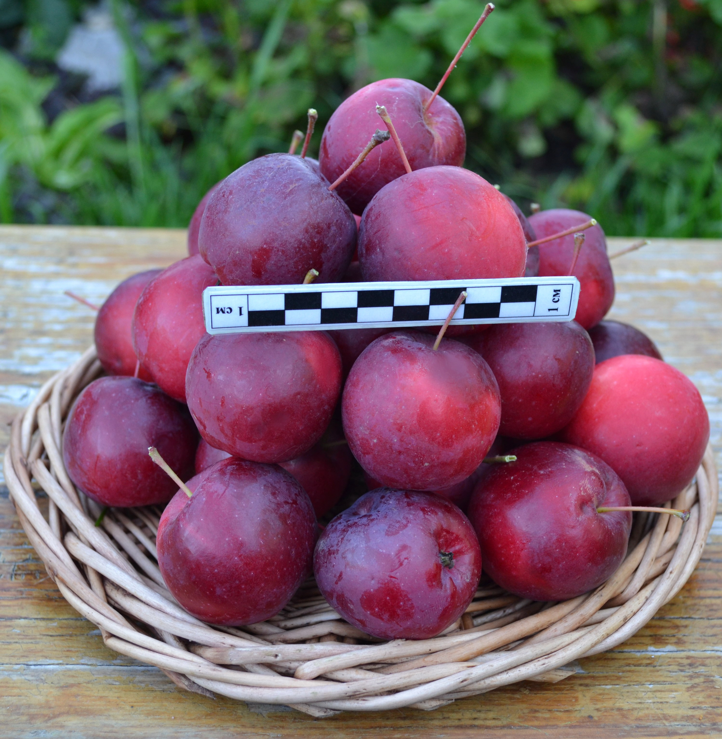 Керр. фото Виталий Брыкин